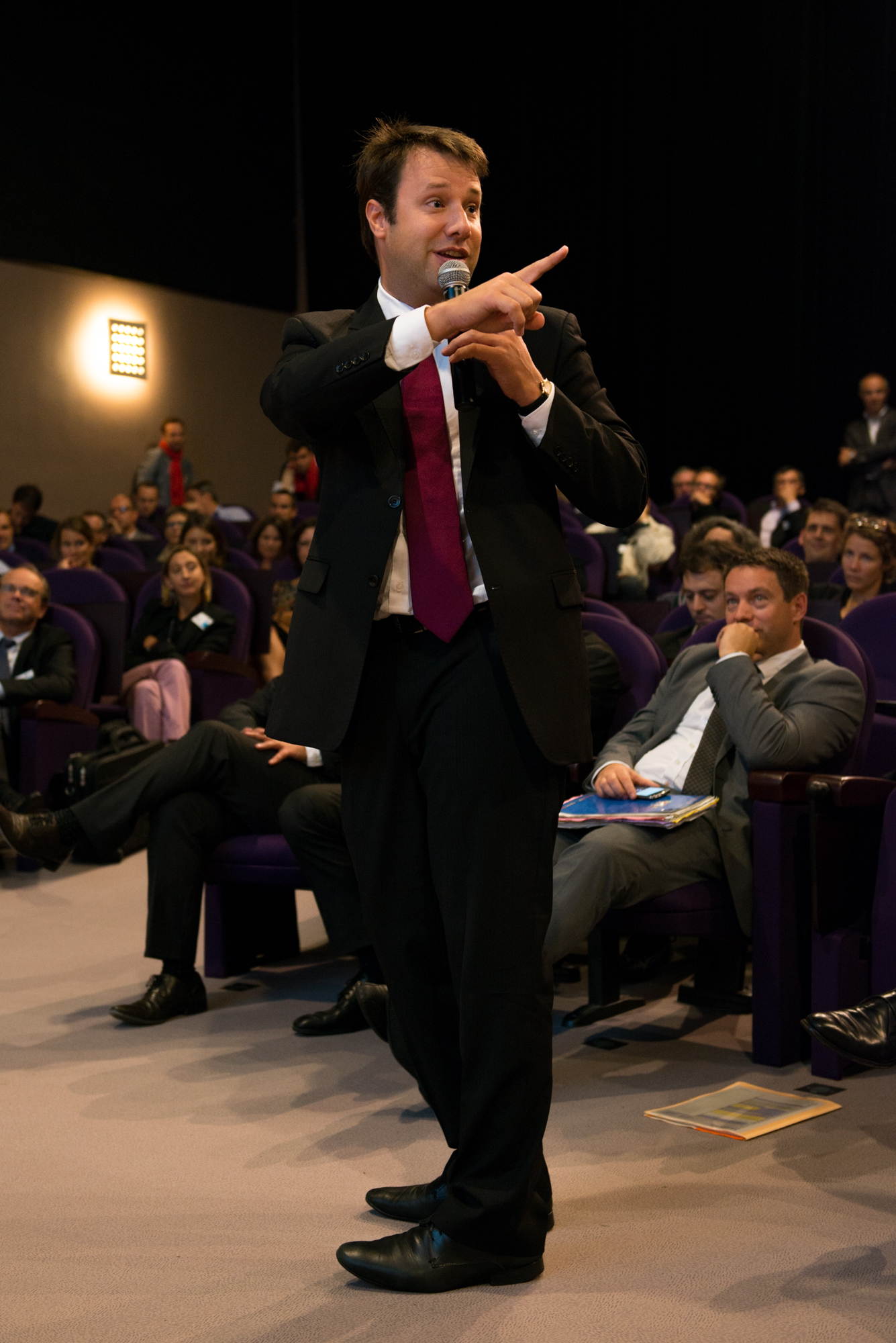 Intervention Loïg Chesnais-Girard octobre 2013 Paimpol